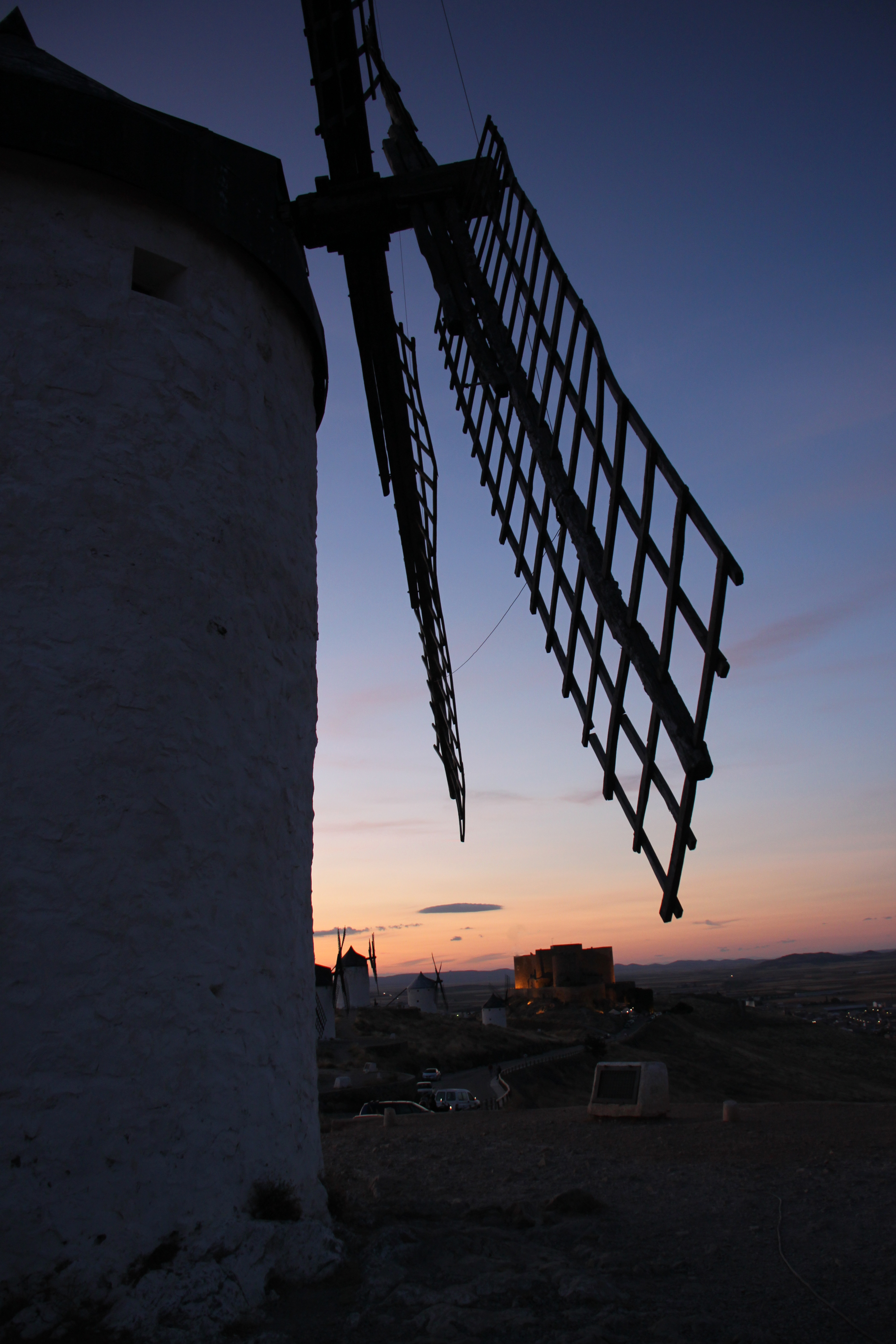 molinos de Consuegra